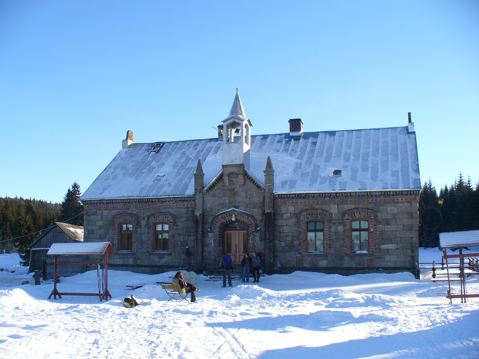 Szklarska Poręba - Schronisko Turystyczne "Orle" w Górach Izerskich